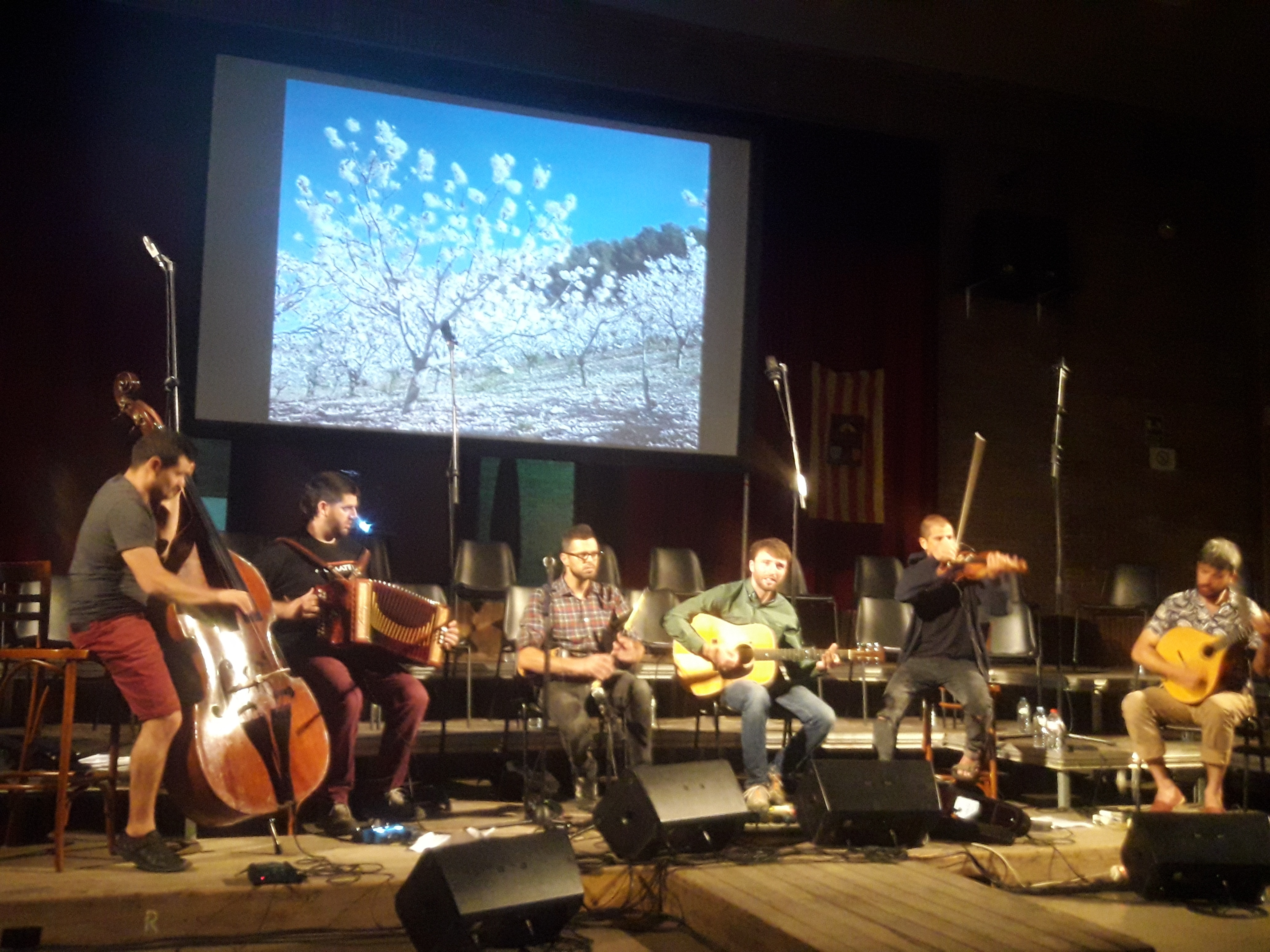 Actuació del grup de folk "RIU" a Sant Climent de Llobregat l'1 de juliol de 2018 amb motiu del 30è aniversari de la Coral La Vall